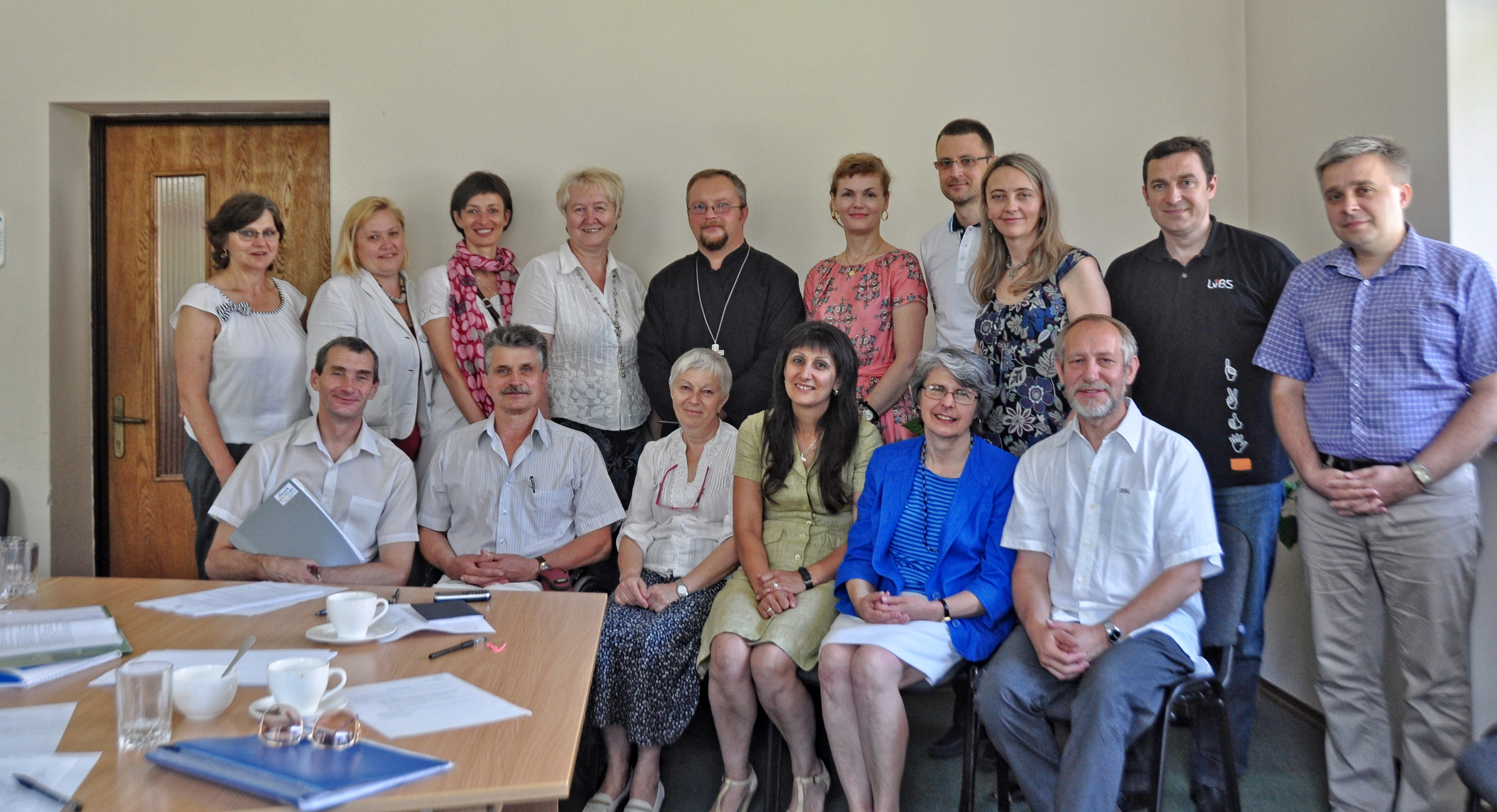 Новосформована Наглядова Рада БУ Навчально-реабілітаційного центру "Джерело" у Львові. Зліва направо стоять: Оксана Кунанець-Сварник, Галина Герасим, Наталя Скрипка, Катерина Гороховська, о. Юрій Саквук, Катерина Кіт-Садова, Костянтин Шумський, Наталія Климовська, Ярослав Рущишин, Олег Романчук; сидять: Мирослав Николаєв, Ярослав Грибальський, Оксана Винярська, Людмила Аннич, Зеня Кушпета, Микола Сварник.